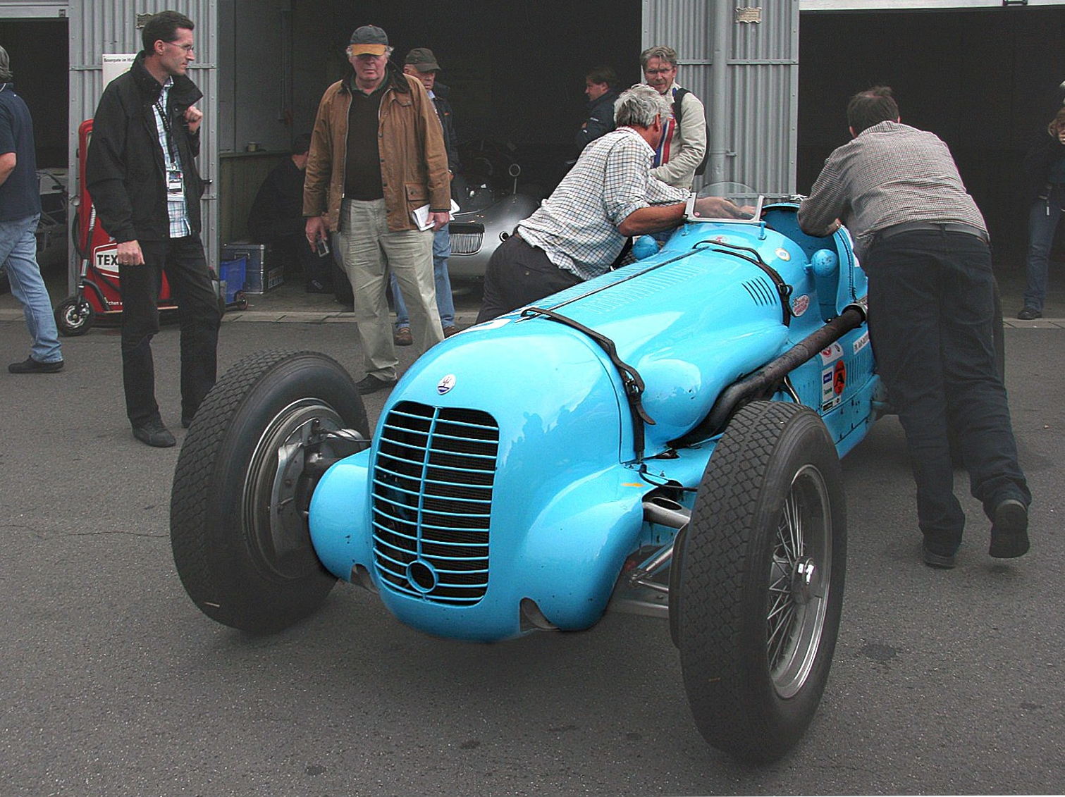 Maserati V8 RI, Baujahr 1935, beim AvD-Oldtimer-Grand-Prix 2011; Wagen von Philippe Étanclein. Vier Exemplare wurden gebaut.